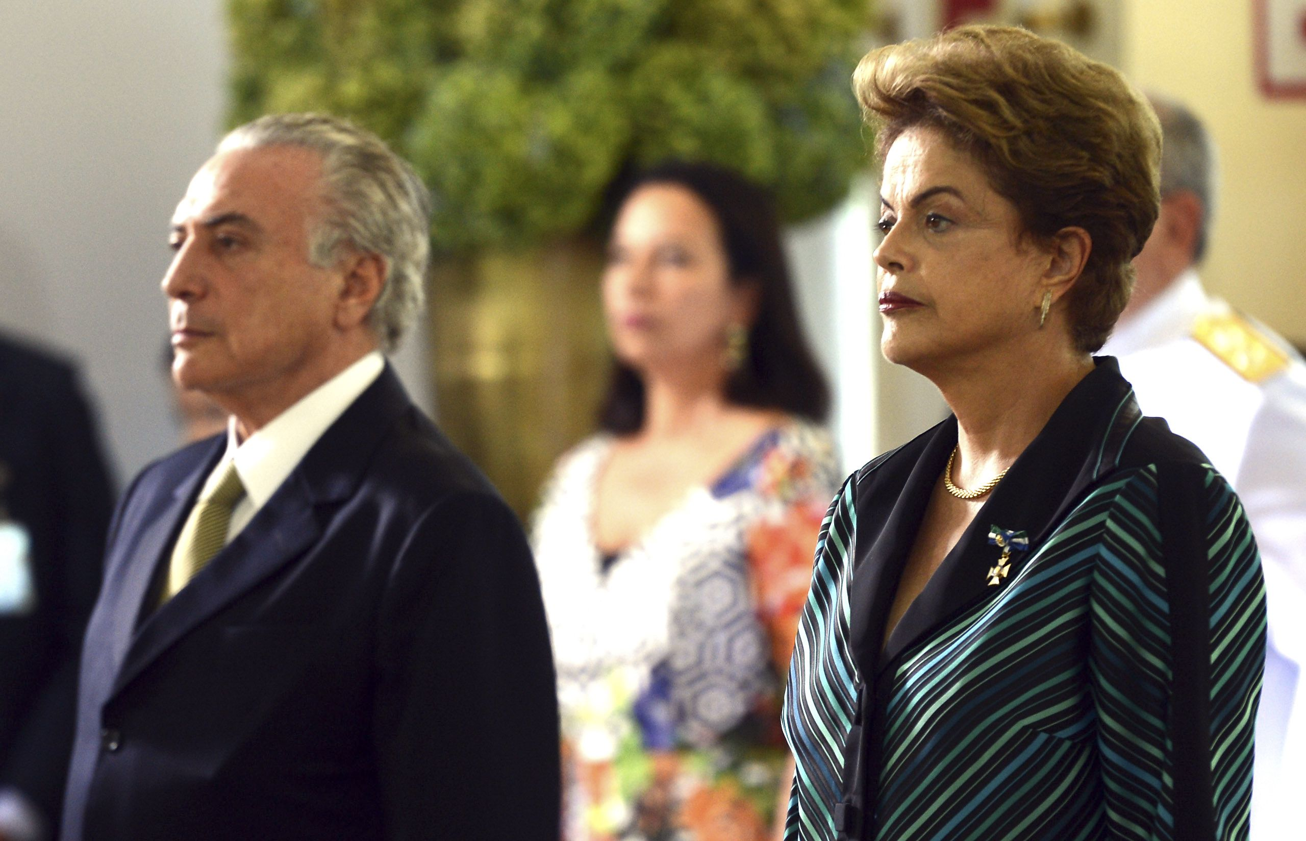 A presidente Dilma Rousseff e o vice-presidente Michel Temer participam da solenidade de cumprimentos aos oficiais-generais, no Clube do Exército.